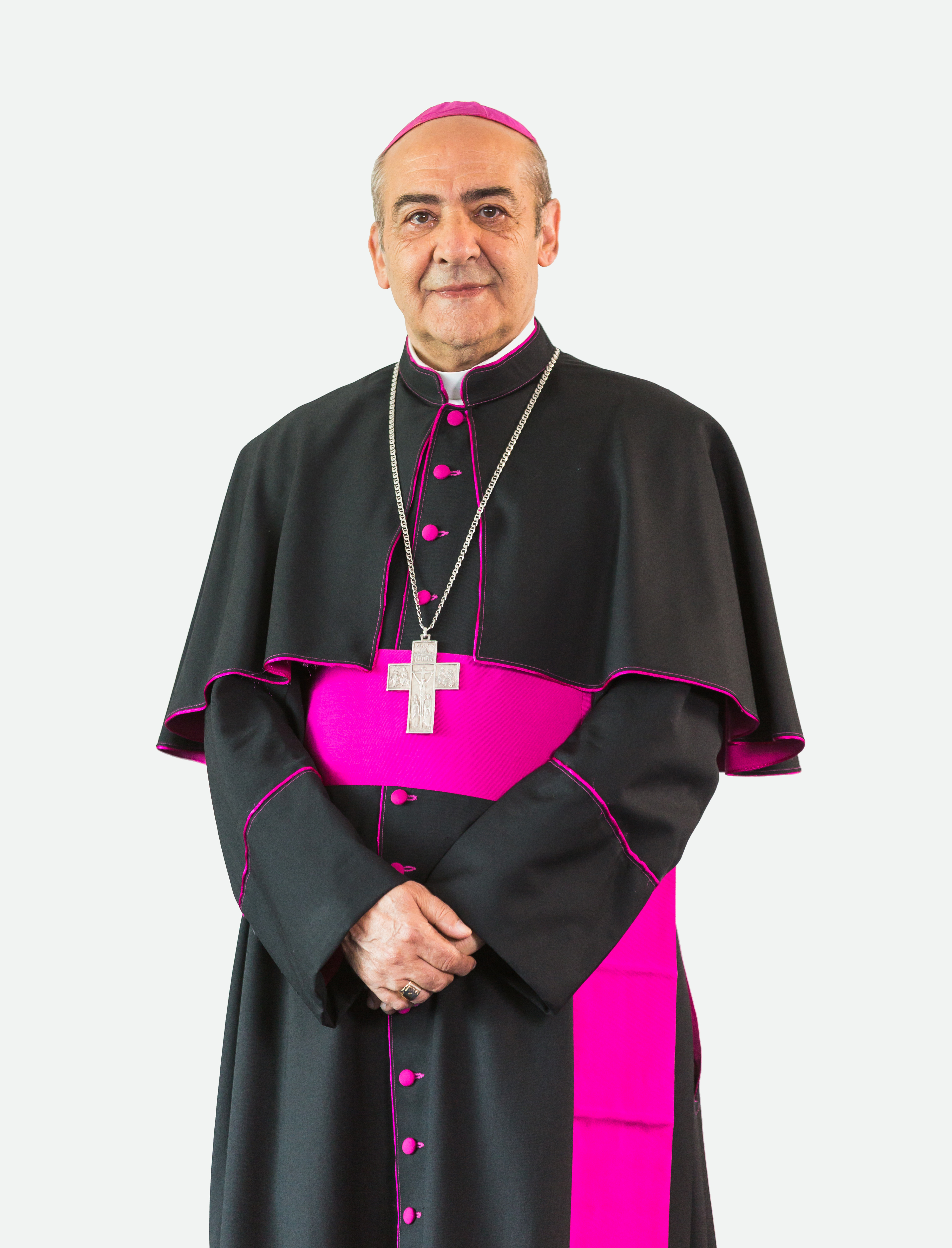 Obispo Amancio Escapa.